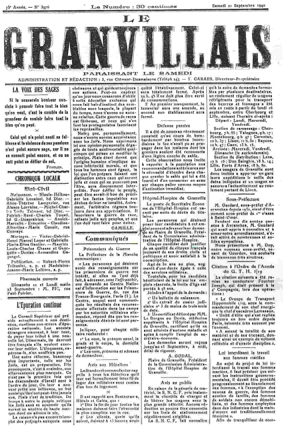 Page de couverture du journal Le Granvillais du 21 septembre 1940 où apparait l'article signé "Camille" s'insurgant contre les lois xénophobes du gouvernement de Vichy.